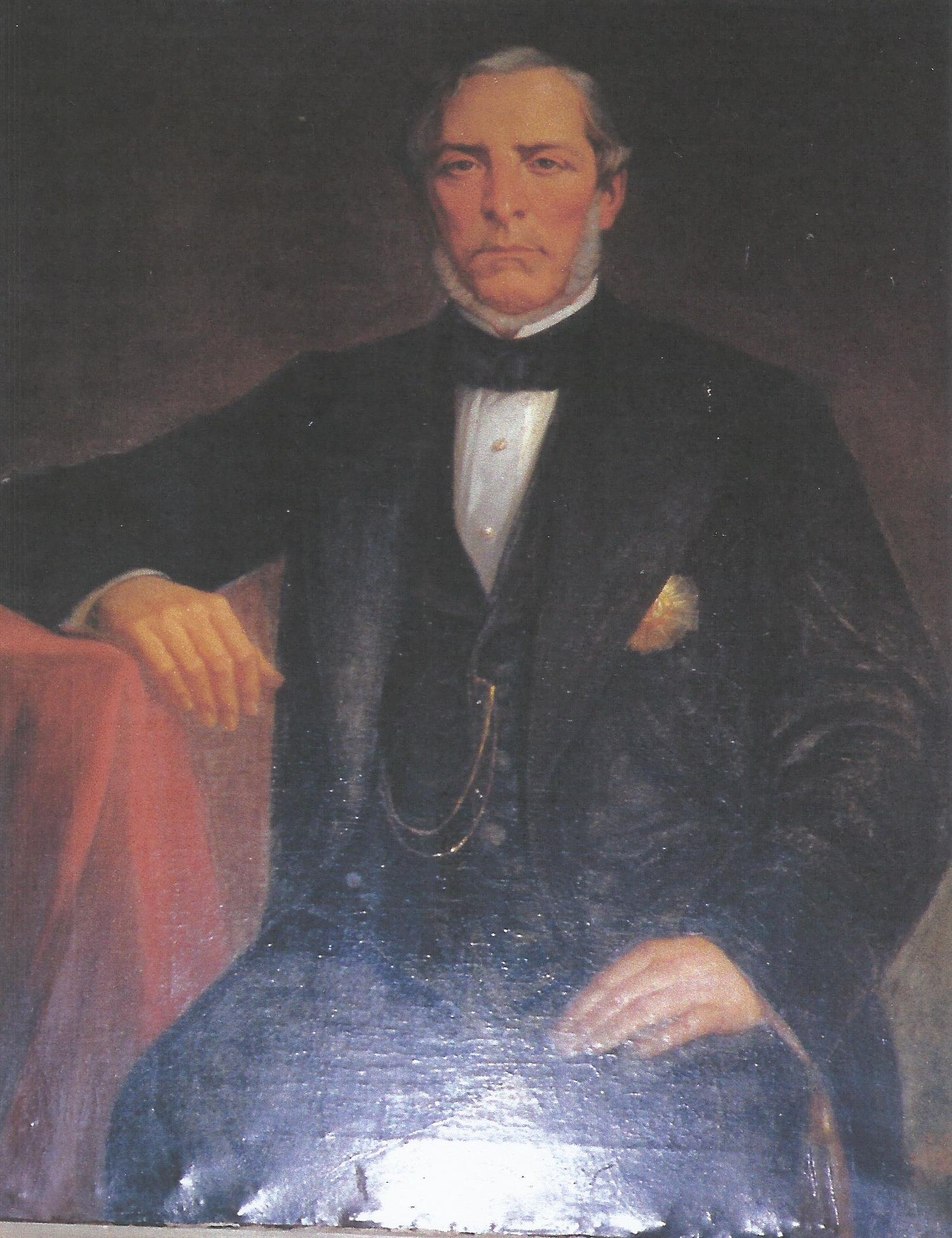 O retrato do Barão de Nova Sintra encontra-se exposto no Colégio Barão de Nova Sintra.